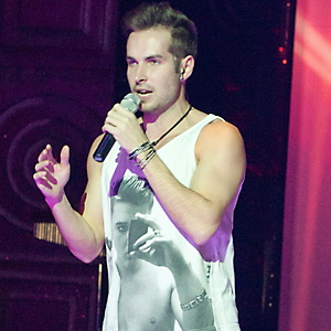 Группа «Morandi» на на шоу-показе в клубе «РАЙ». 2011 год.